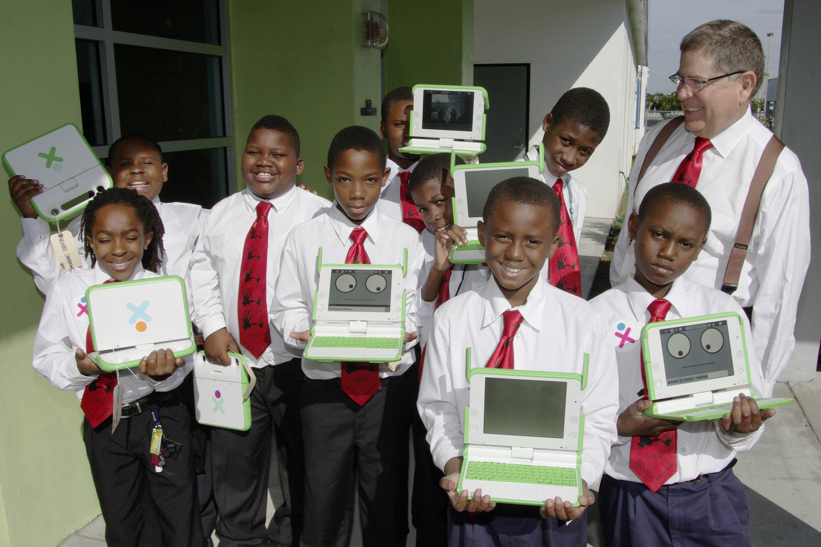 Miami Jan 2012.